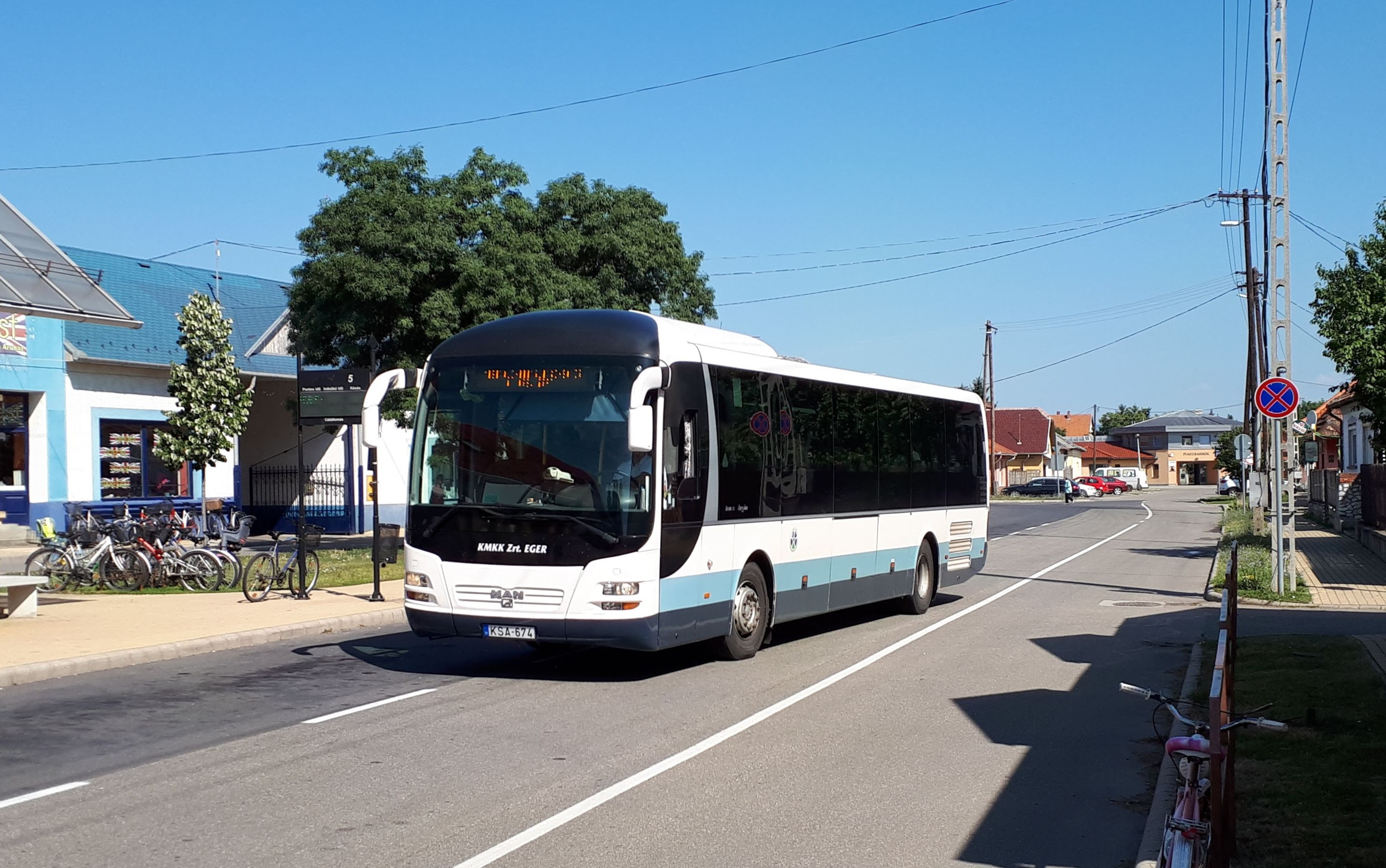 A KMKK KSA-674 rendszámú MAN Lion's Regio típusú busza Mezőkövesden, a 1380-as helyközi járaton.